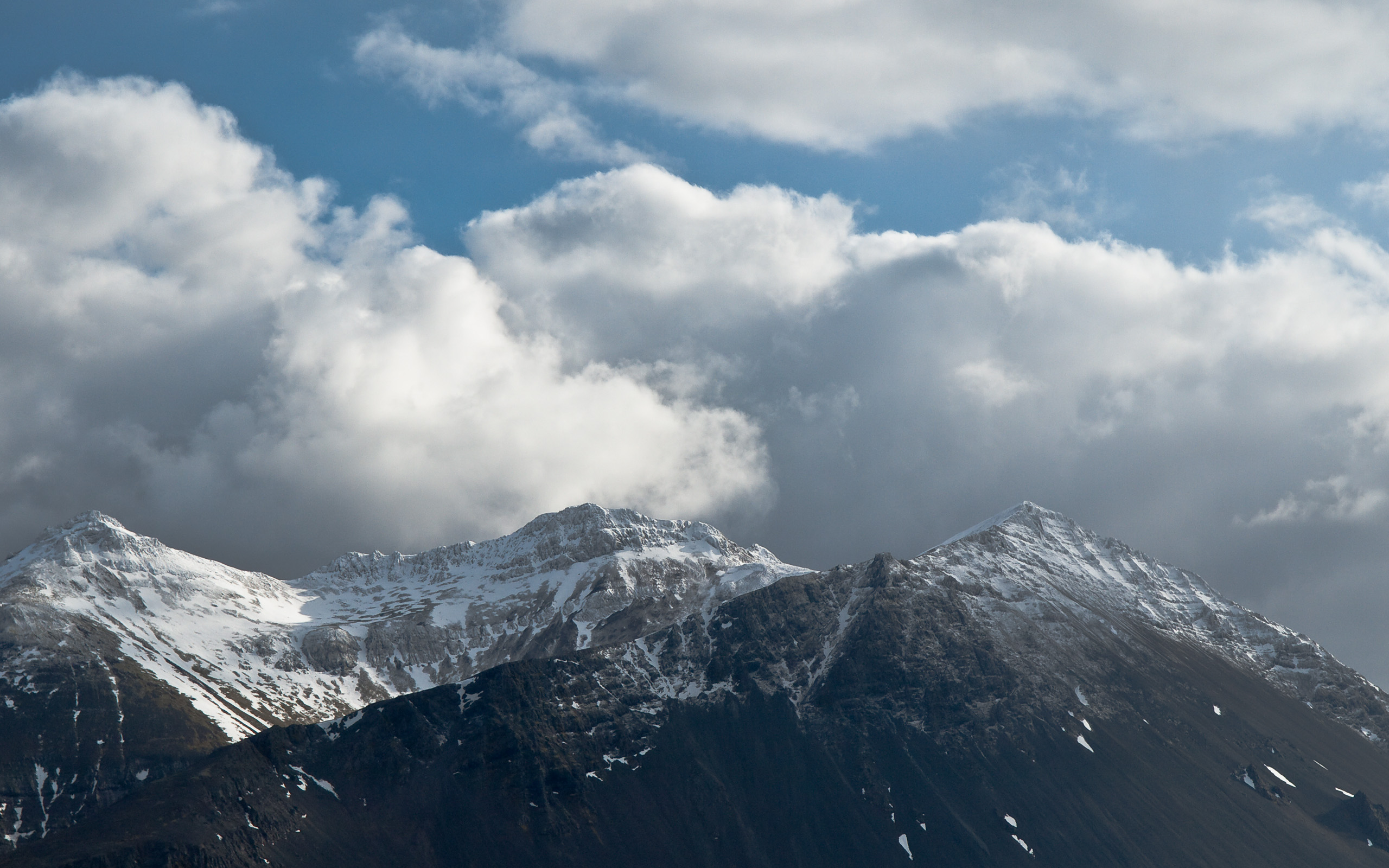 Hafnarfjall